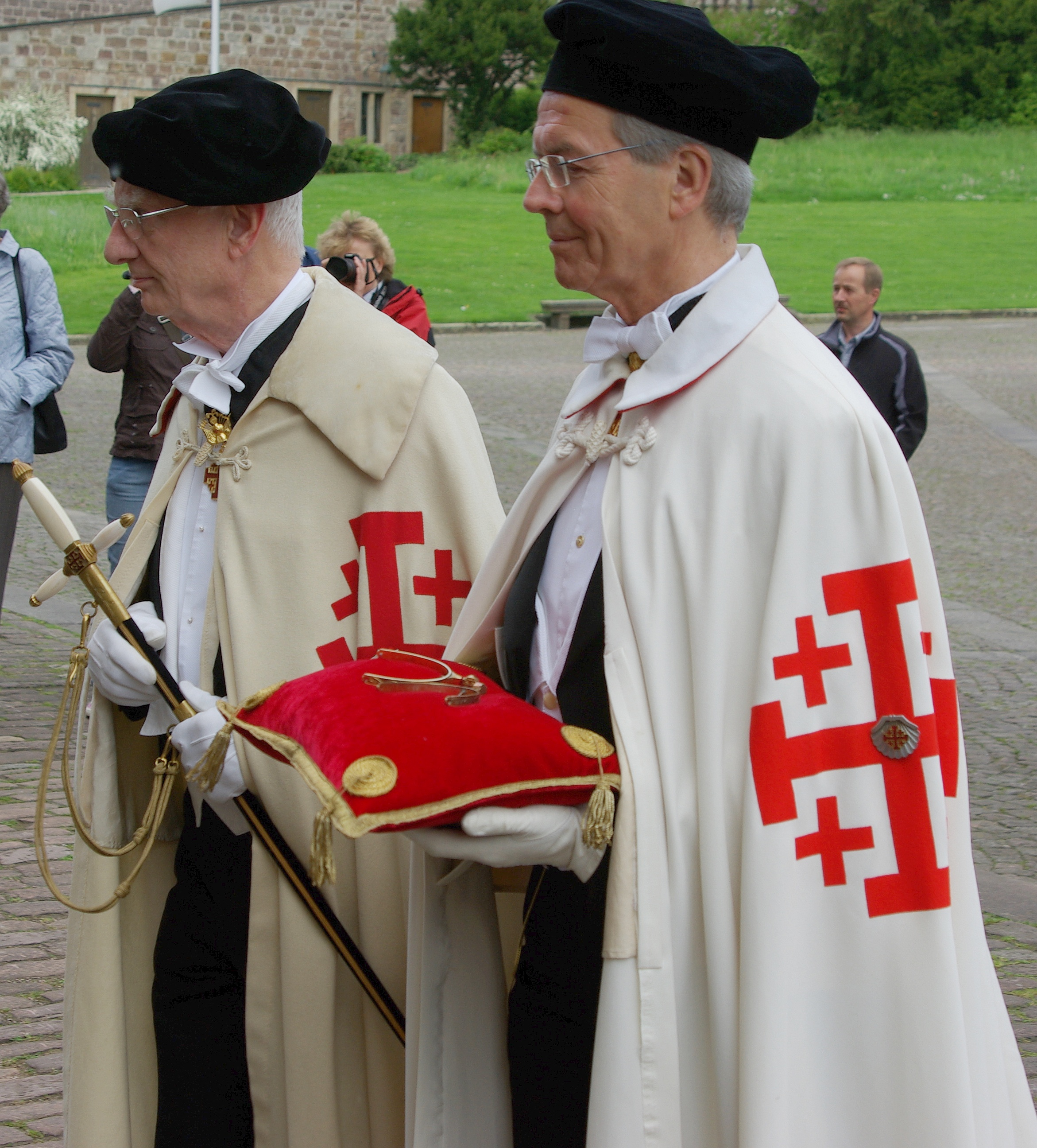 Einzug zur Investitur der Deutschen Statthalterei des Ritterordens am 16.5.2009 in den Hohen Dom zu Fulda (Germany)